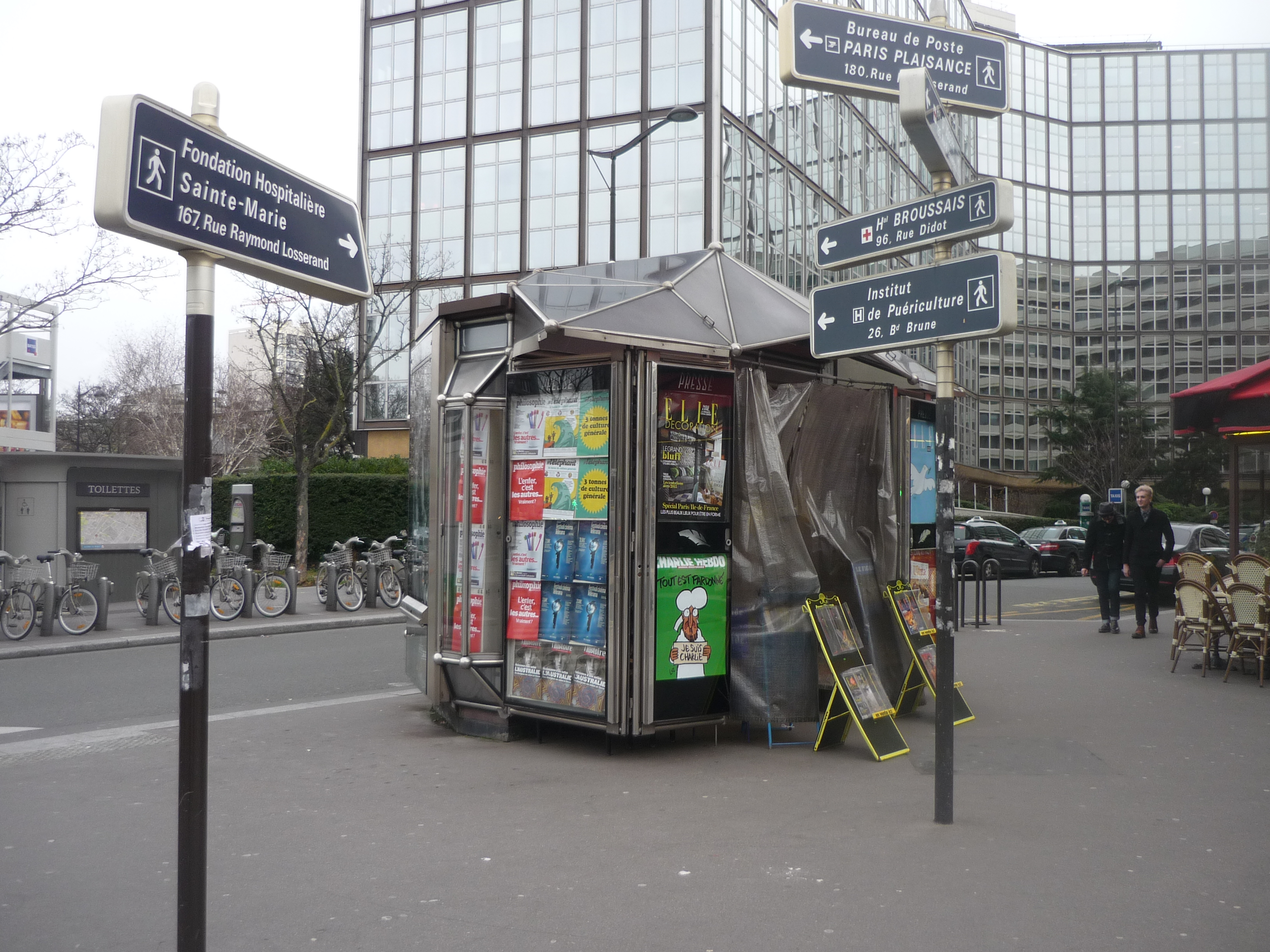 Le kiosque affiche la publicité pour le numéro de Charlie Hebdo des survivants. Derrière le kiosque on aperçoit une station de vélibs et une sanisette. Nombreuses pancartes d'indications.